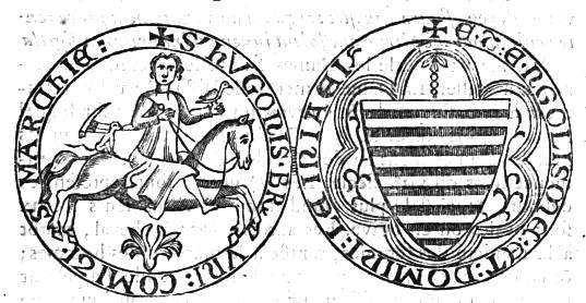 Hugh XIII of Lusignan